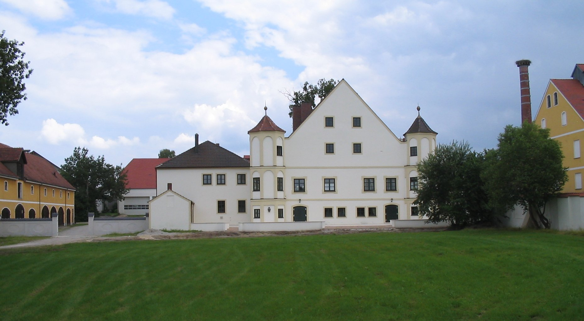 Summary Bildbeschreibung: Törring´sches Schloss in Pörnbach Quelle: selbst fotografiert Fotograf: Benutzer:Eppasandas Datum: Juli 2006